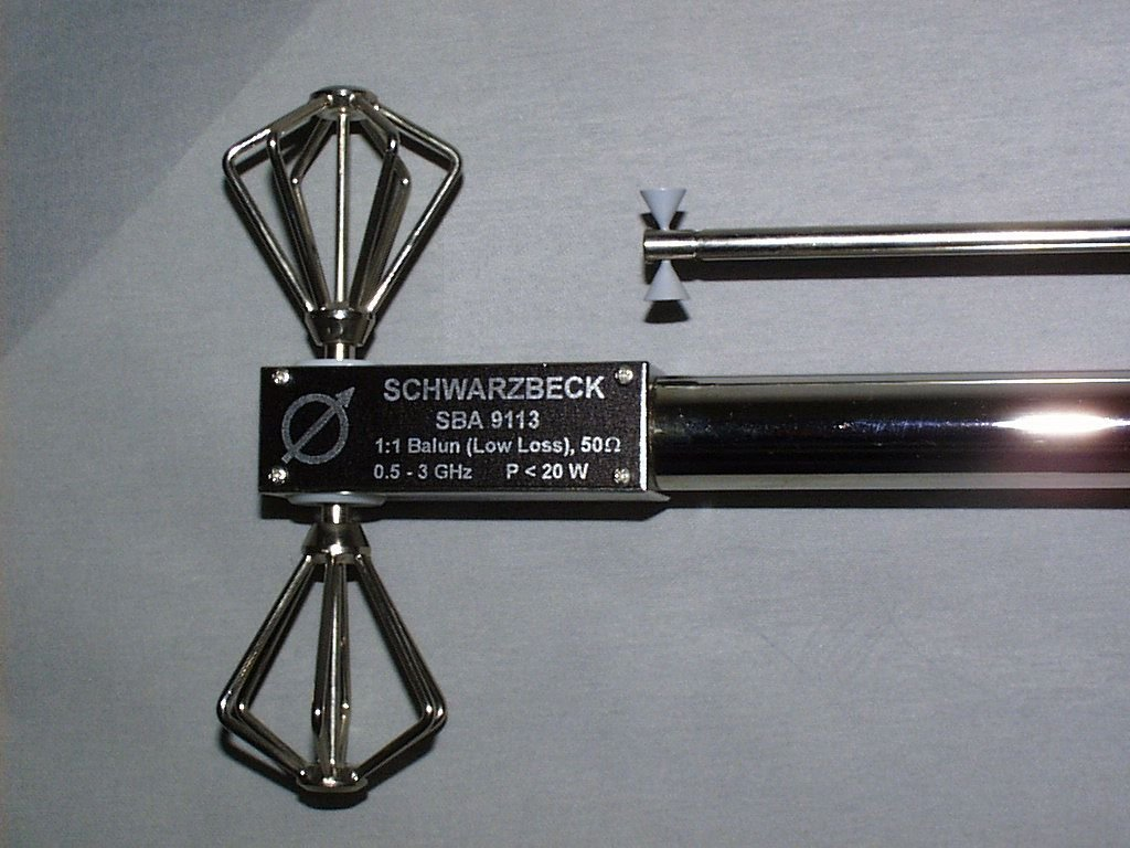 Small Biconical Microwave Antenna(SBA 9113: 0.5 – 3 GHz, SBA 9112: 1 – 18 GHz)